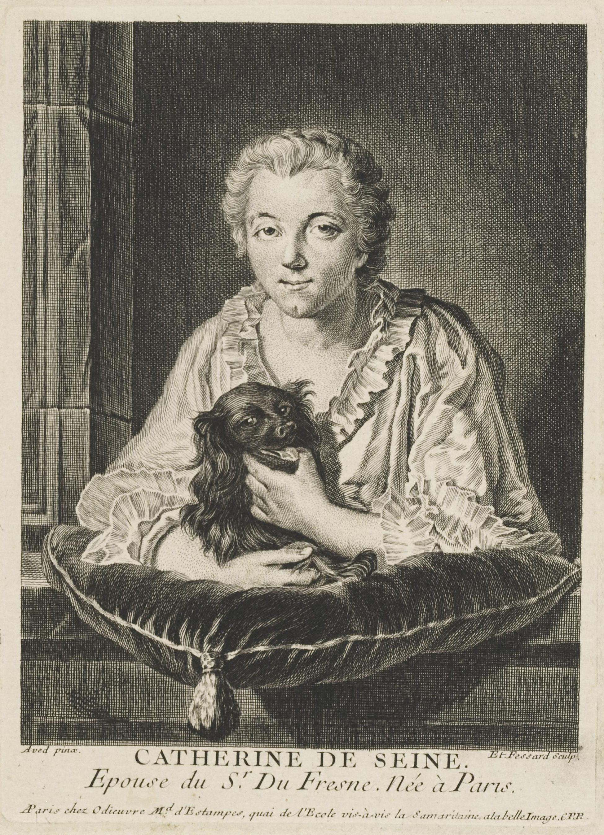 Bildnis der Catherine de Seine Leipzig, Universitätsbibliothek Leipzig, Porträtstichsammlung, Inventar-Nr. 47/132